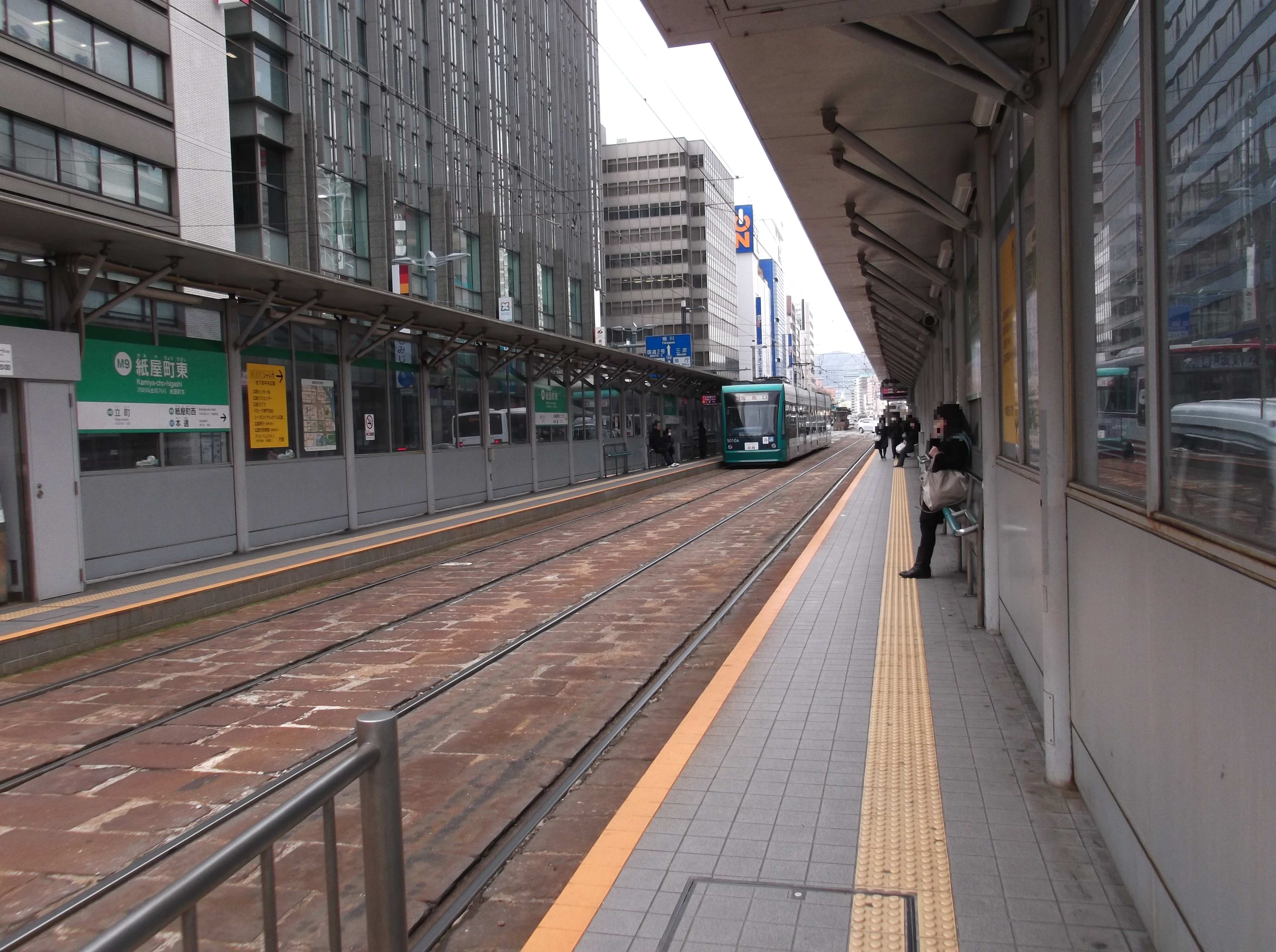 広島駅方面乗り場から見た宇品・宮島口方面乗り場